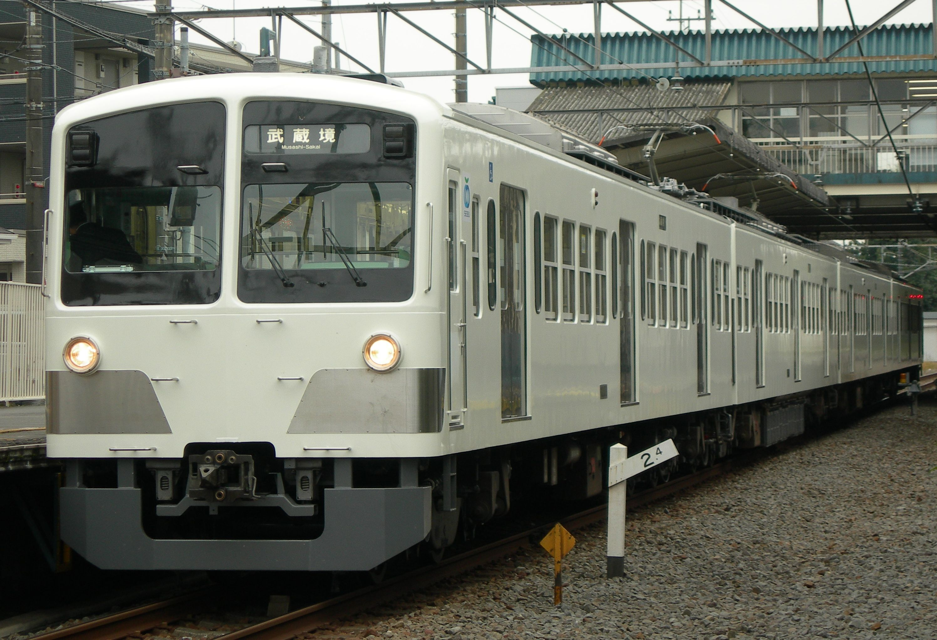 西武 新101系電車 259F